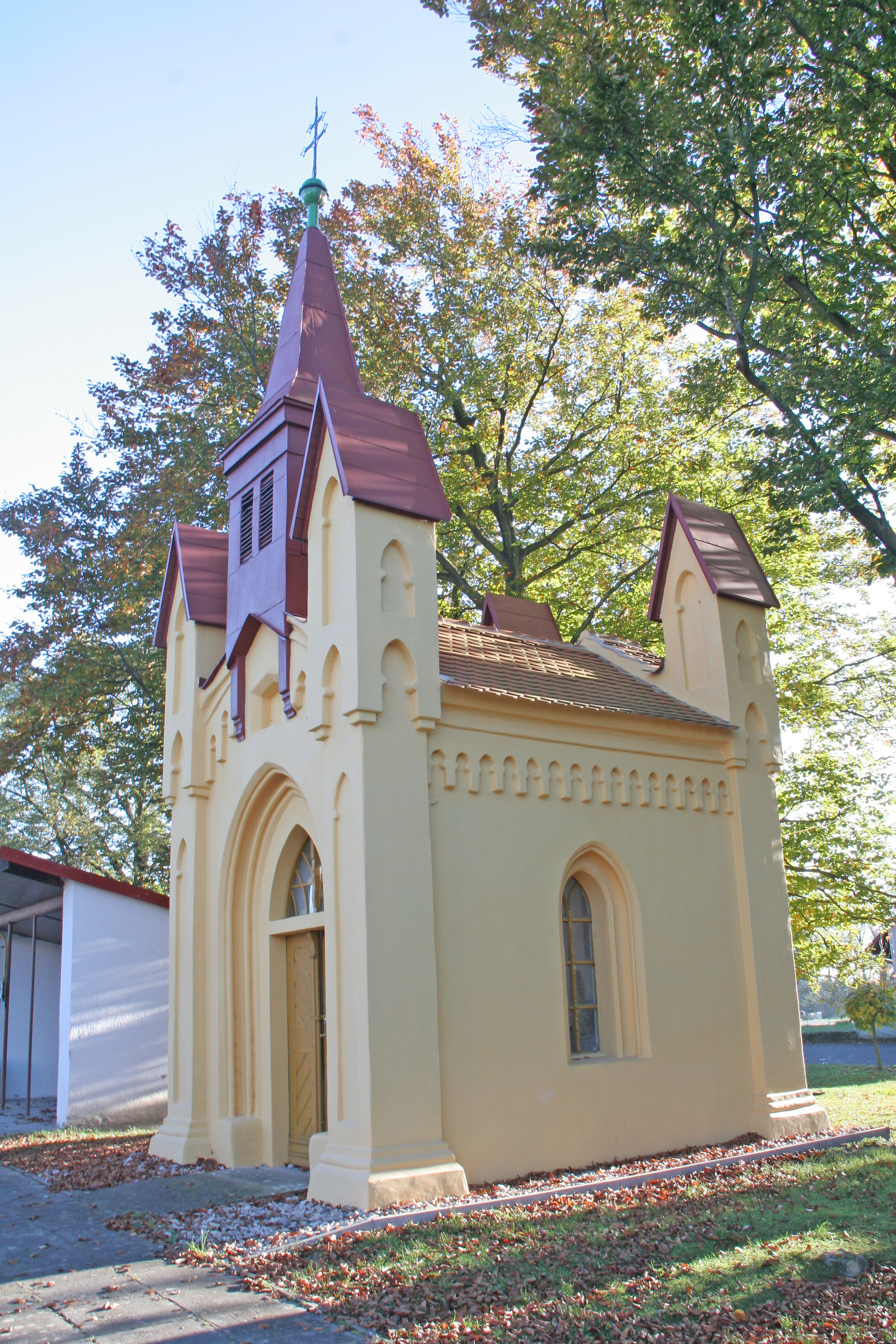 Zaříčany kaple